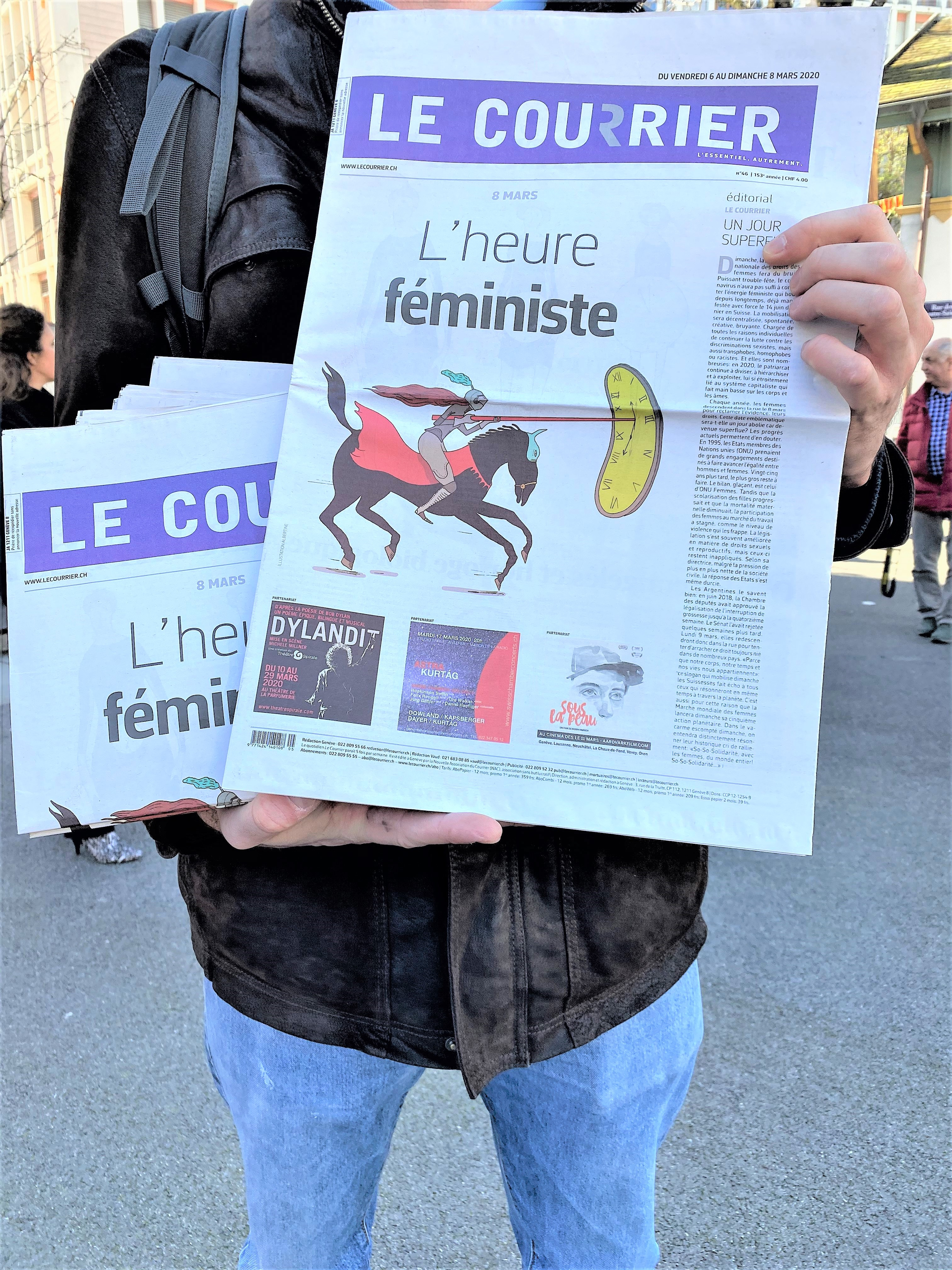 Manifestation du 8 mars 2020 à Genève devant l’Union Ouvrière de Genève et sur la place des Grottes, un endroit emblématique du féminisme à Genève puisqu’en 1976 le centre femme du café Papillon fut démoli par les autorités municipales. Les femmes en colère manifestèrent et murèrent avec du ciment et des briques l’entrée du conseil municipal.